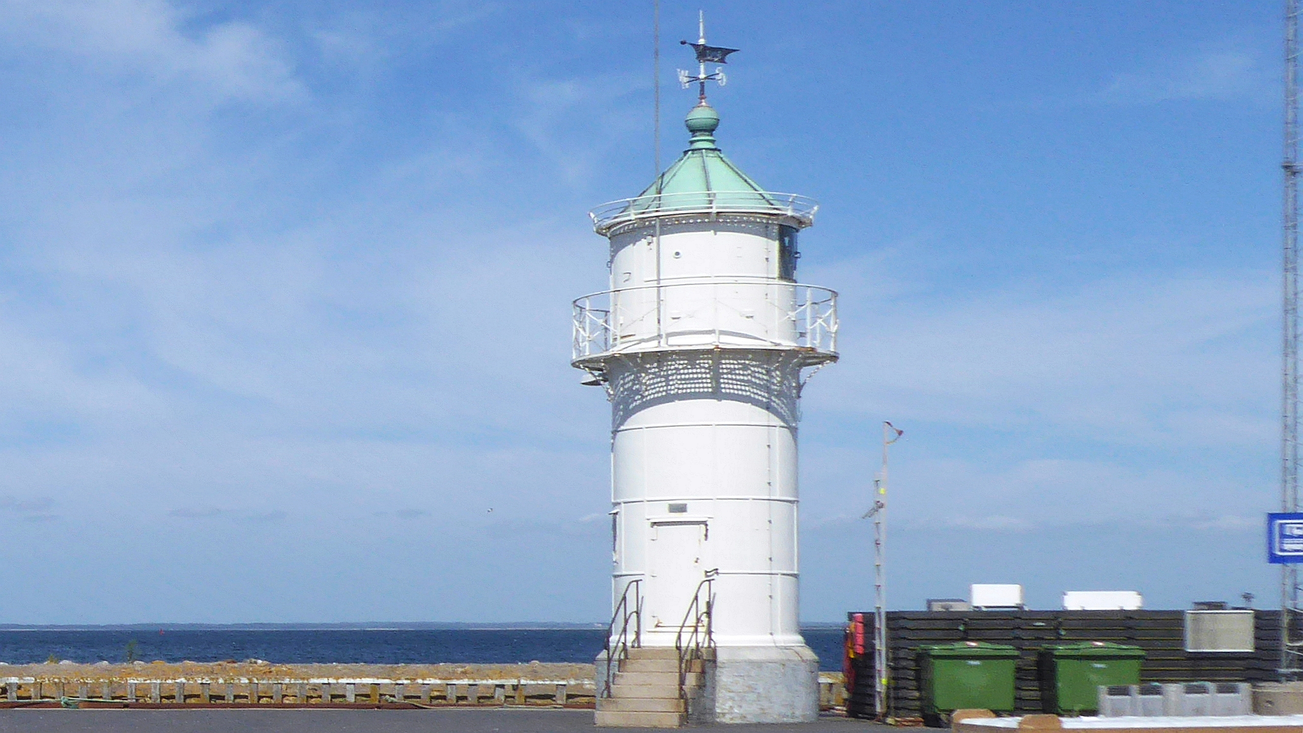 Aarösund stählerner Leuchtturm Årøsund von 1905 Höhe 10 m, erbaut von Julius Pintsch Söhne, Jütland Dänemark Foto Wolfgang Pehlemann P1210684